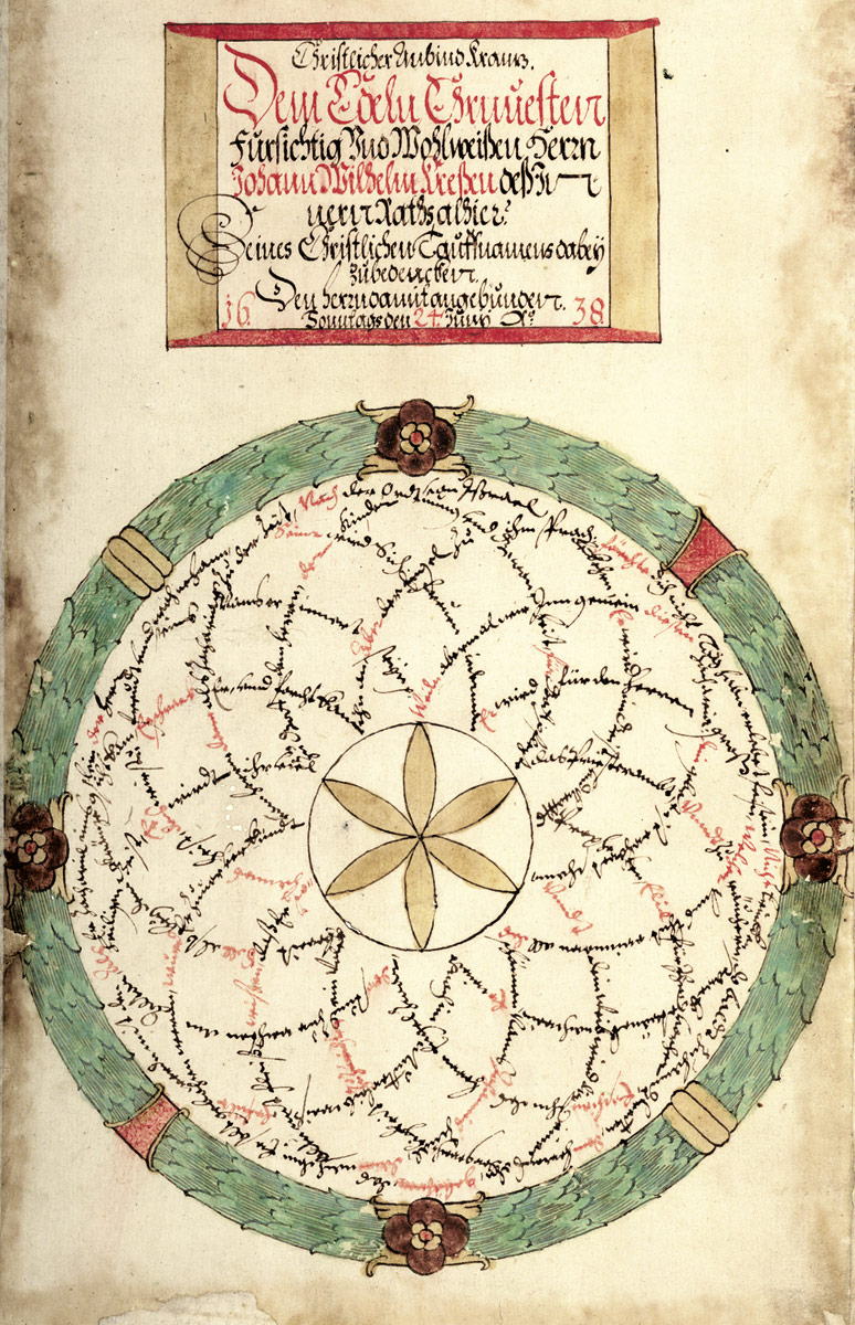 Figurengedicht, aus einem Exemplar von Luthers Kirchen Postilla des Nürnberger Patriziers und Ratsherrn Johann Wilhelm Kreß von Kressenstein (1589-1657). Spiegel hinten mit Widmung für Kreß: "Christlicher Anbind Krancz / Dem Edeln Ehrnvesten / fürsichtig vnd Wohlweißen Herrn / Johann Wilhelm Kreßen des Jnnern Raths alhier Seines Christrlichen Tauffnamens dabey zu bedencken. Sonntags den 24. Juny Anno 1638". Darüber ein kreisförmiges Figurengedicht, "Weiln abermal wir Jnn gemein dießen Tag er lebet fein, welcher vnns thut erinnern all des schönnen Namens Johannis zumal, dann nach ihm Er solt gebohrn wern, wurd Er zuuor verkündt vom herrn, dann als Zacharias zu der Zeit, nach der Ordtnung vnd Gewonheit für Gott pflegte das Priesteramt ..."